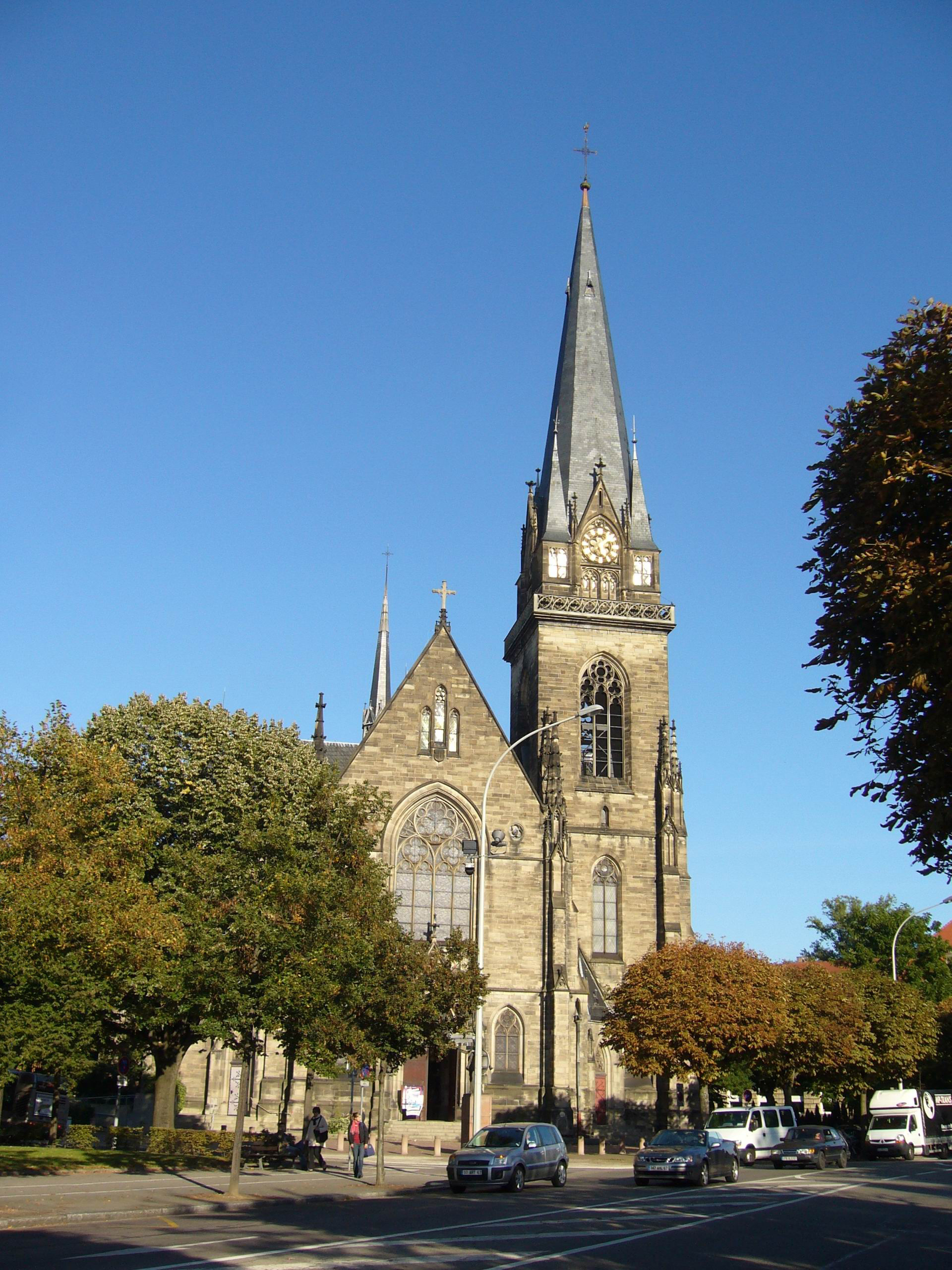 Eglise Saint-Maurice, Strasbourg